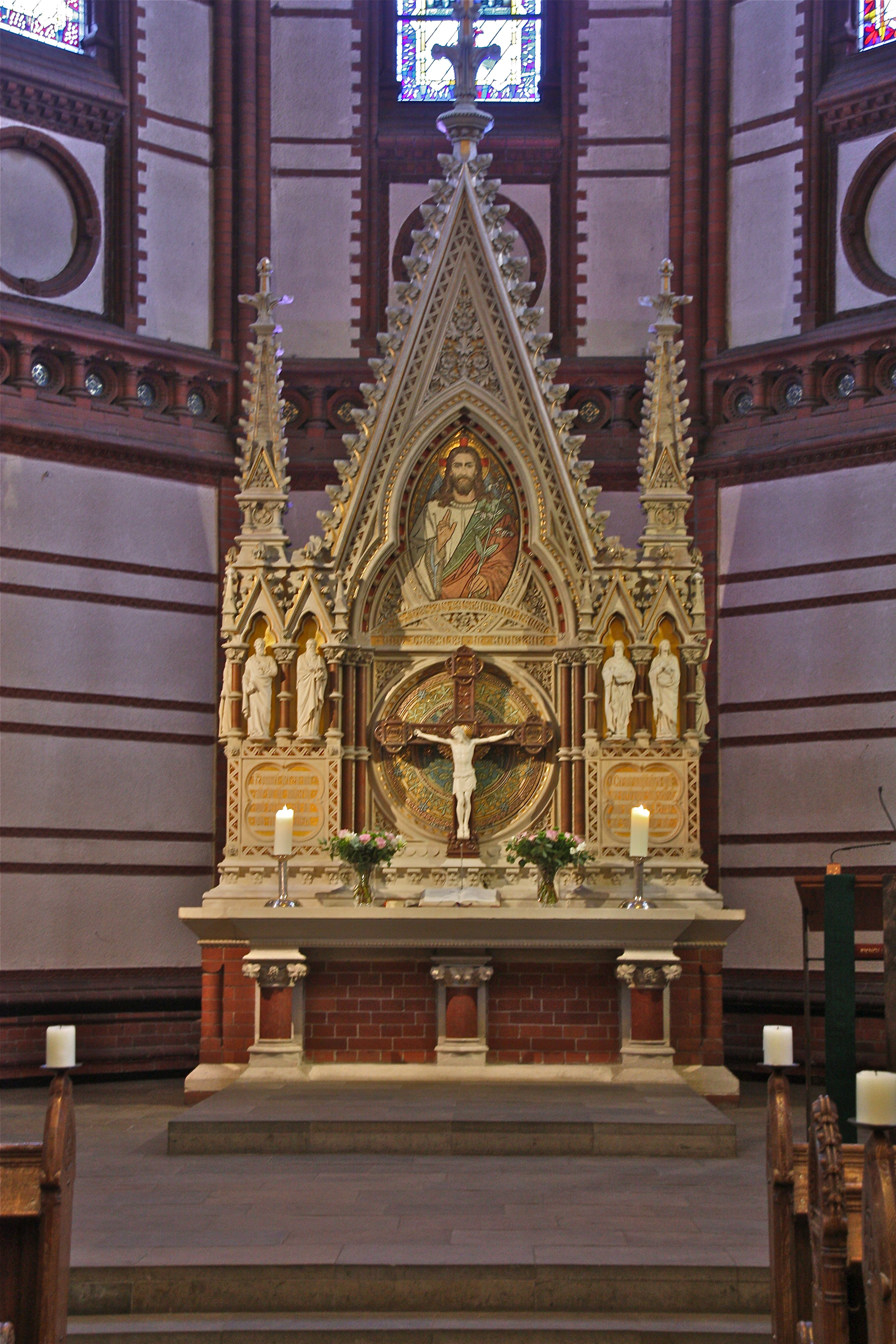 Hamburg, Uhlenhorst, Kirche St. Gertrud, Innenraum, Altar